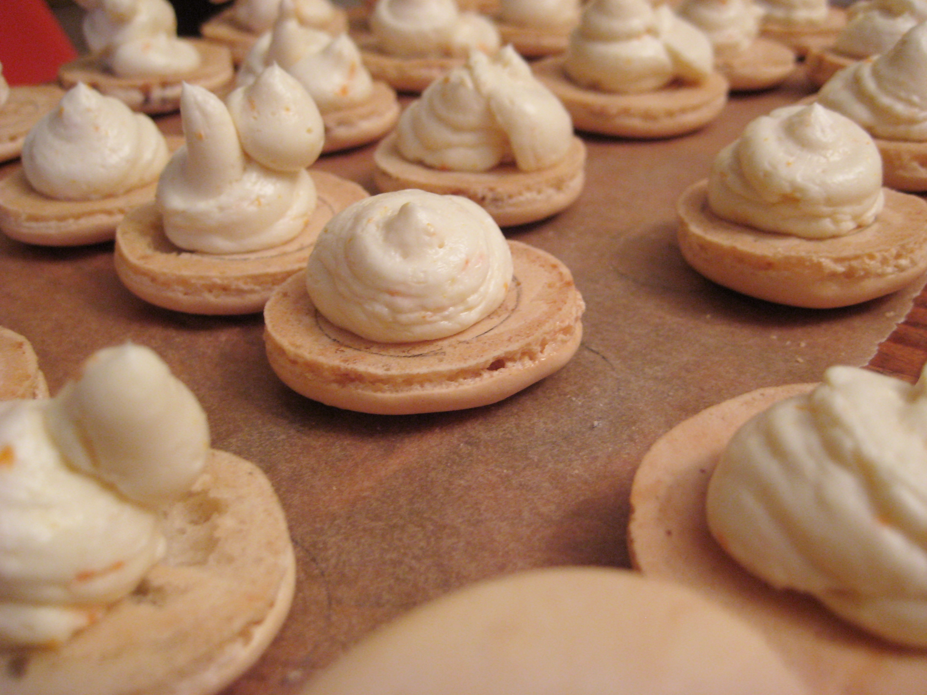 Valentine macarons!